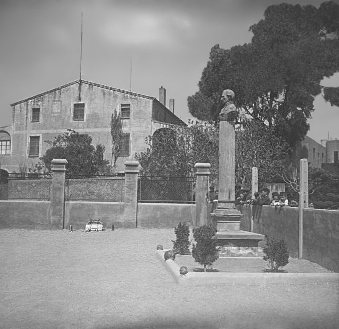 Monument al general Manso. Josep Salvany i Blanch (1923)